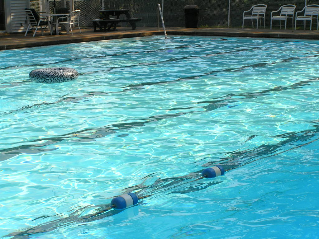 Swimming pool